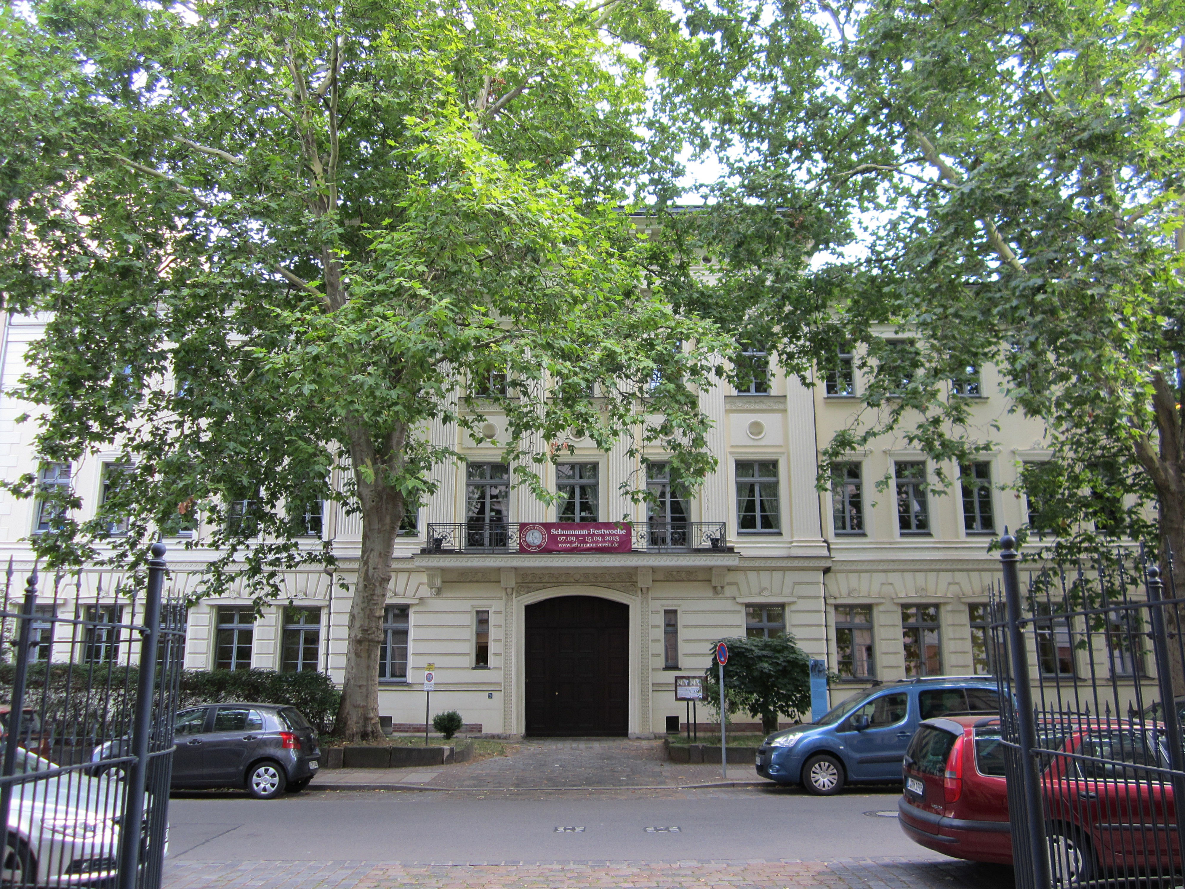 Mietshaus Inselstraße 18, Schumann-Haus